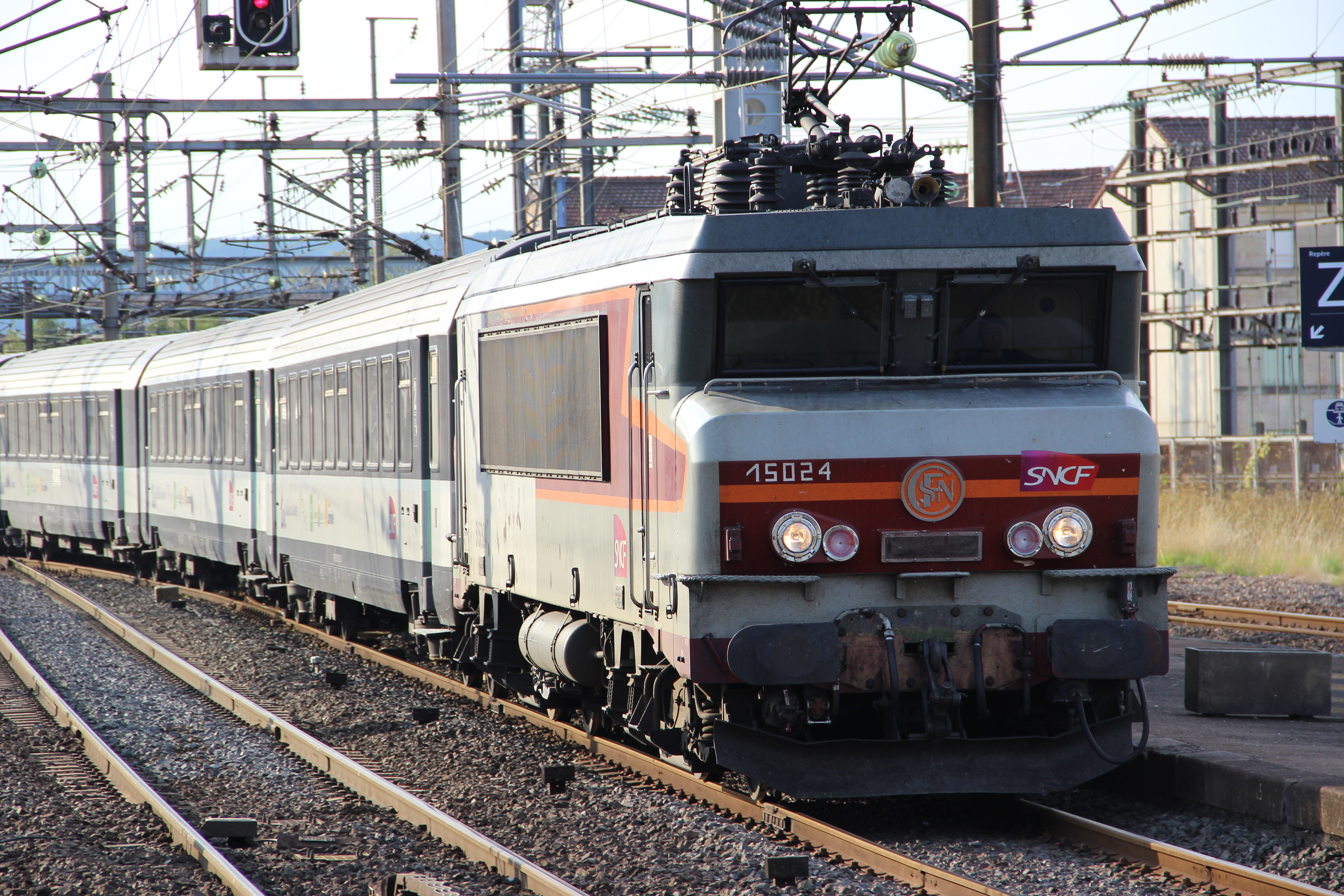 Une BB 15000 tractant un TER Vallée de la Marne entre en gare de Bar-le-Duc